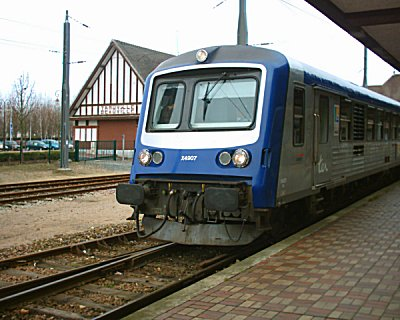 An X4900 at Trouville-Deauville Station, Deauville.